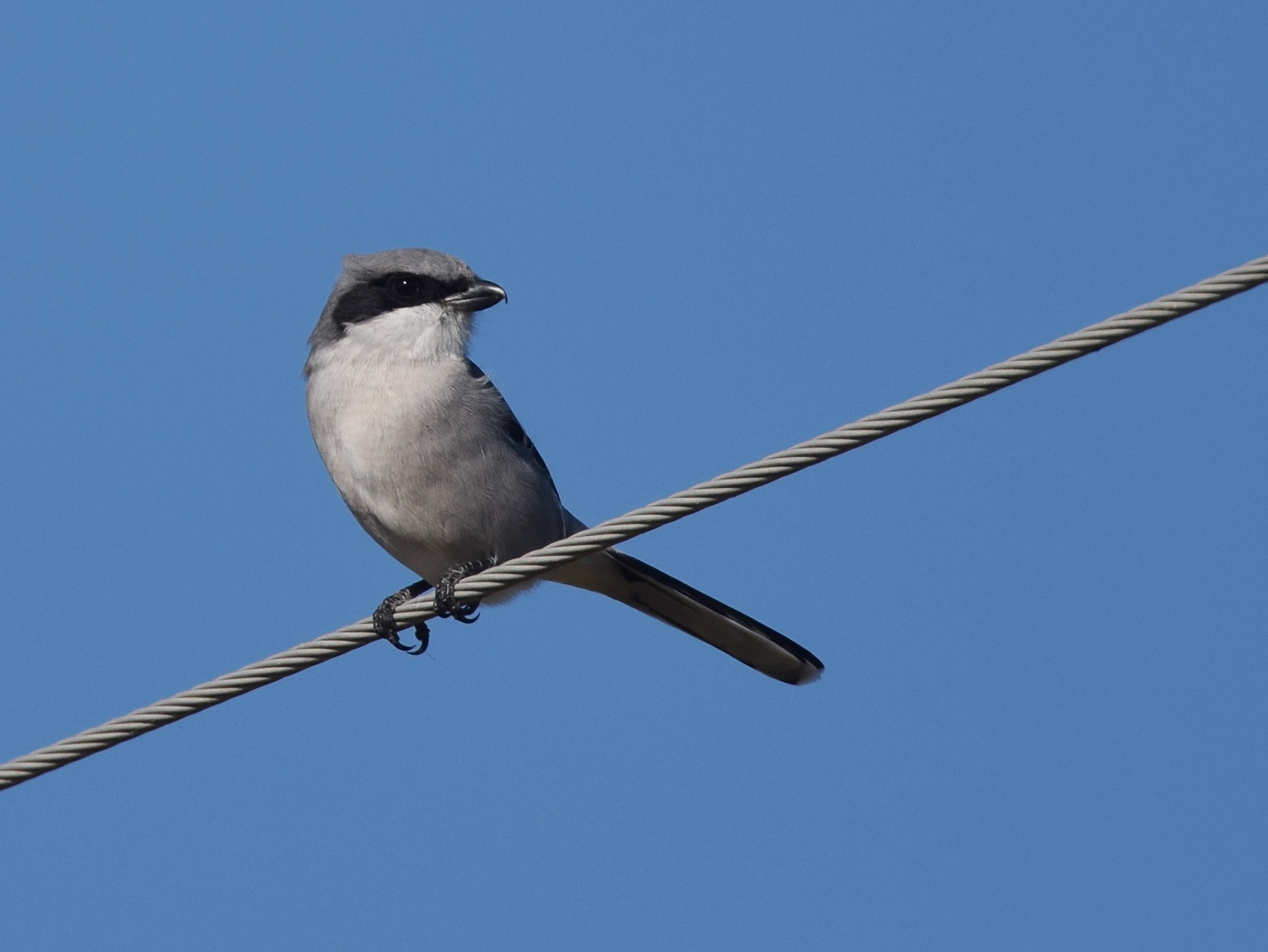 Loggerhead Shrike